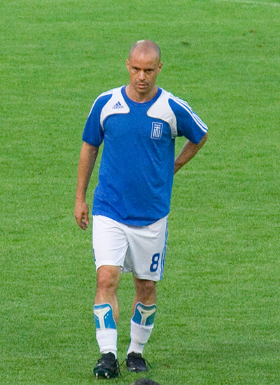 Stelios Giannakopoulos 2008